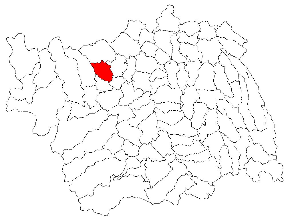 Categorie:Hărţi ale judeţului Bacău